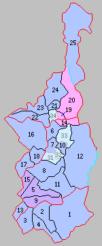 北海道空知支庁の町村。